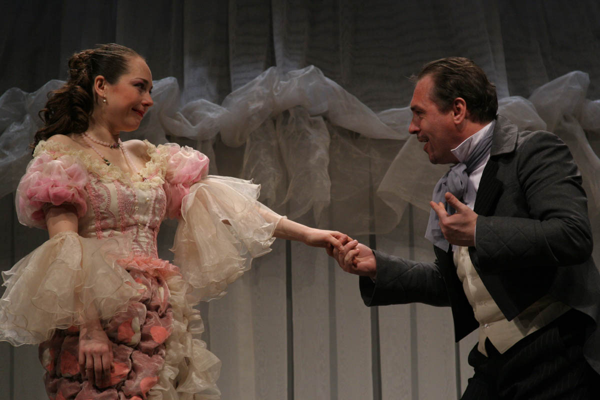 Сцена из спектакля Саратовского академического театра драмы «Женитьба». Татьяна Родионова (Агафья Тихоновна) и Игорь Баголей (Подколесин)